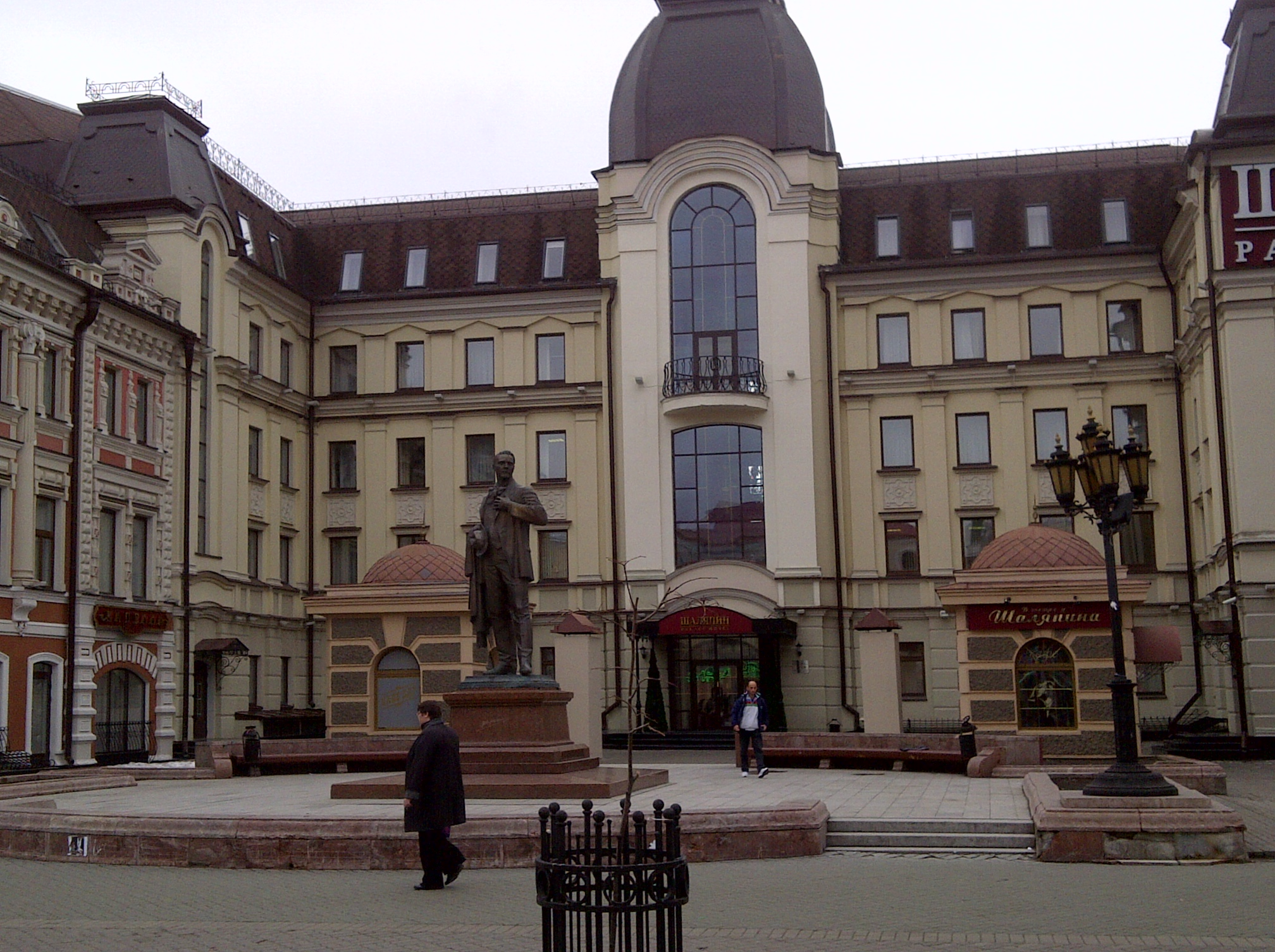 Kazan's 5 Star Hotel - Shalyapin Kazan Palace Hotel